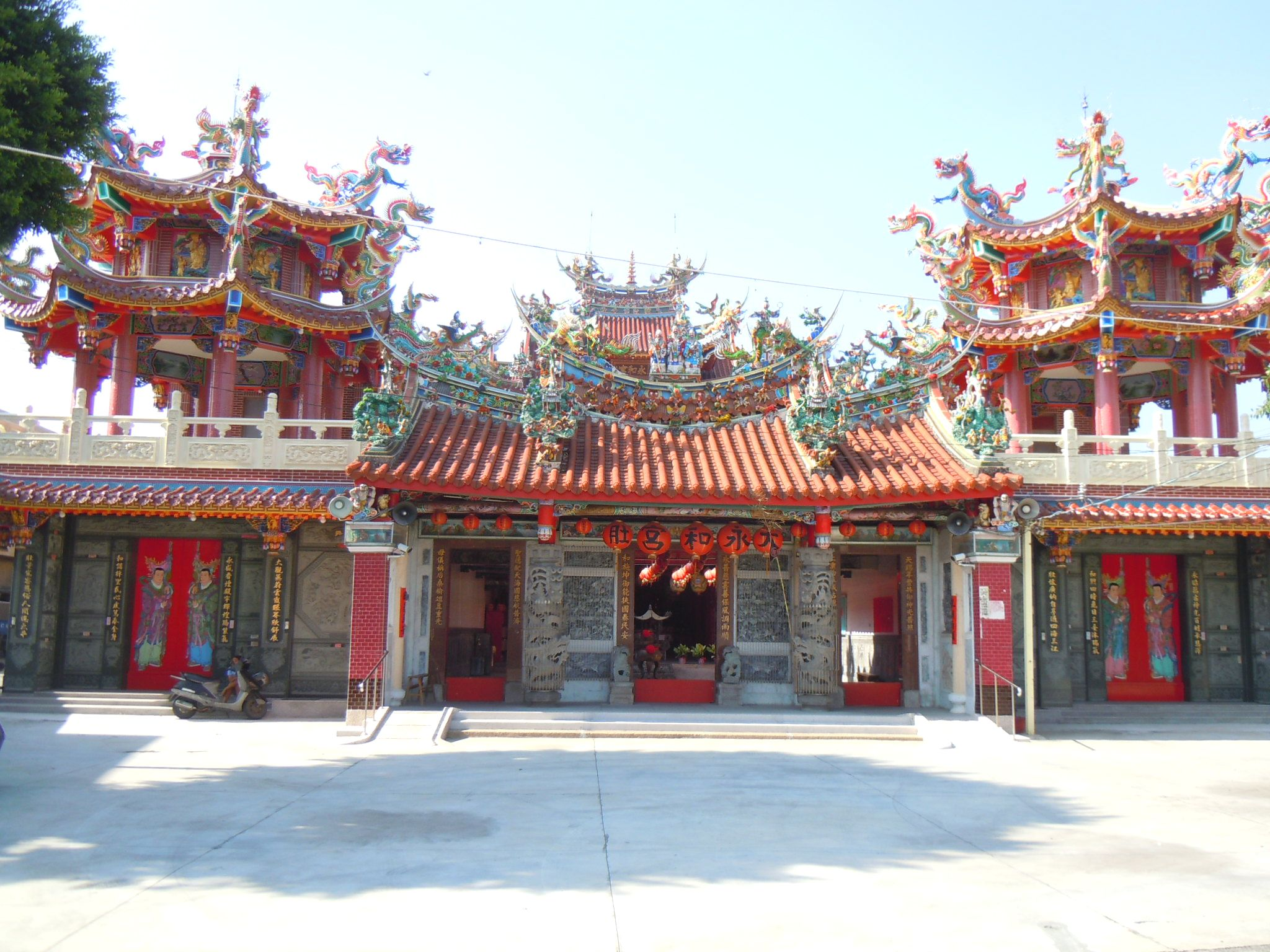 下街永和宮位在臺中市大肚區永和里12號。